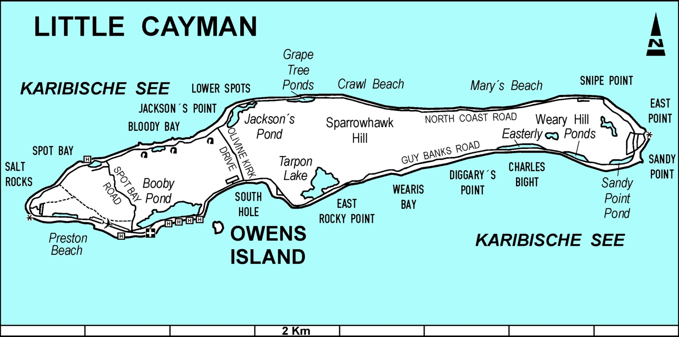 Karte der Insel Little Cayman